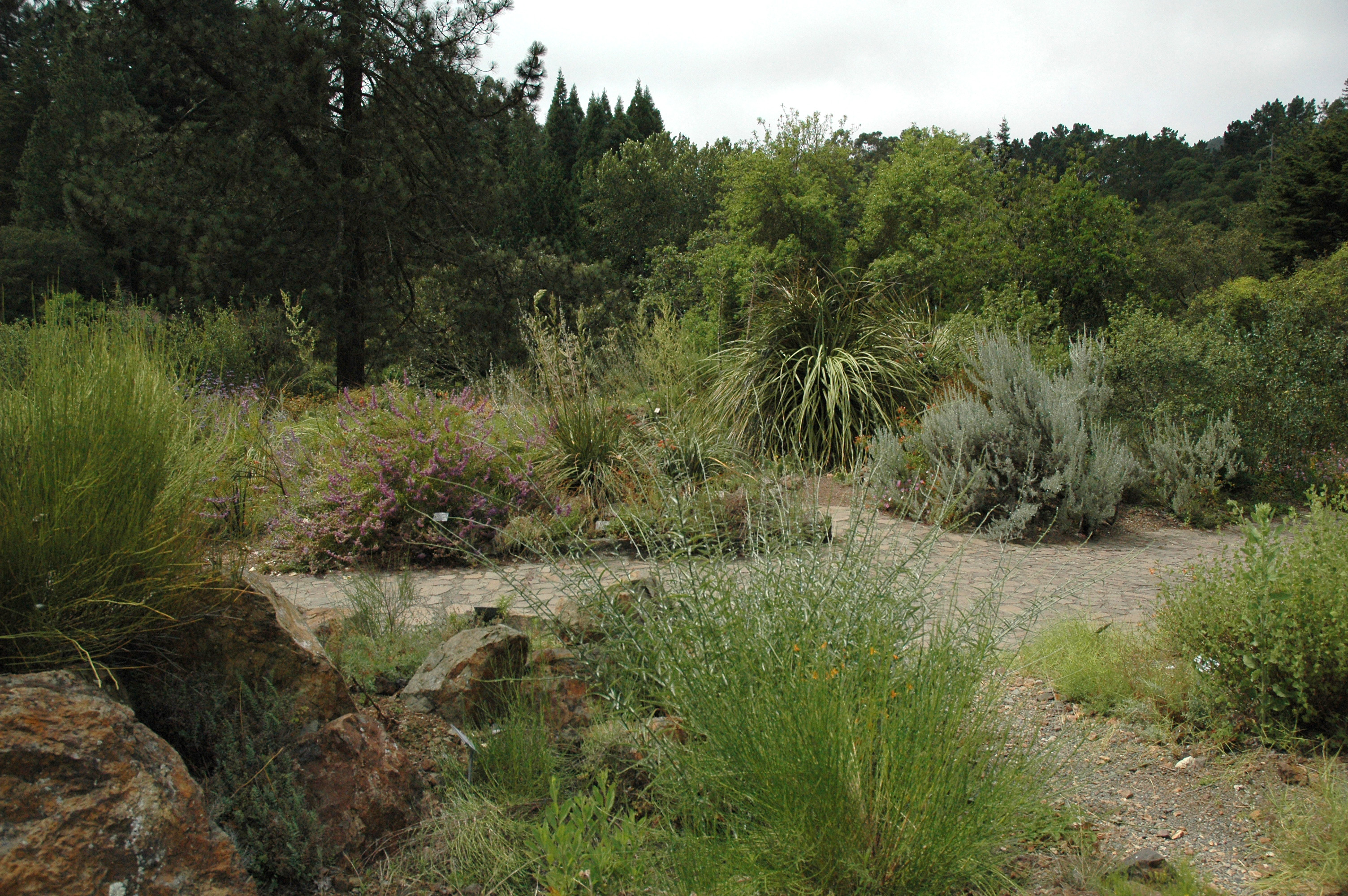 Inside Tilden Park Botanical garden.